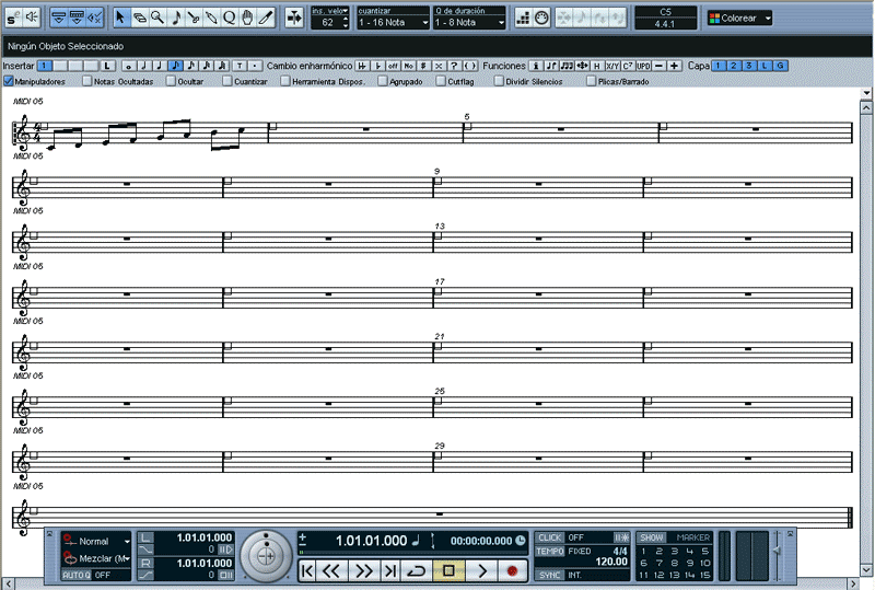 Secuenciador musical (software). Sección de partitura.